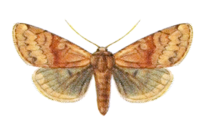 [Episilia] loresi [sic] (Staud.) = Xestia lorezi lorezi (Staudinger, 1891), ♂, Tyrol ("Tirol").